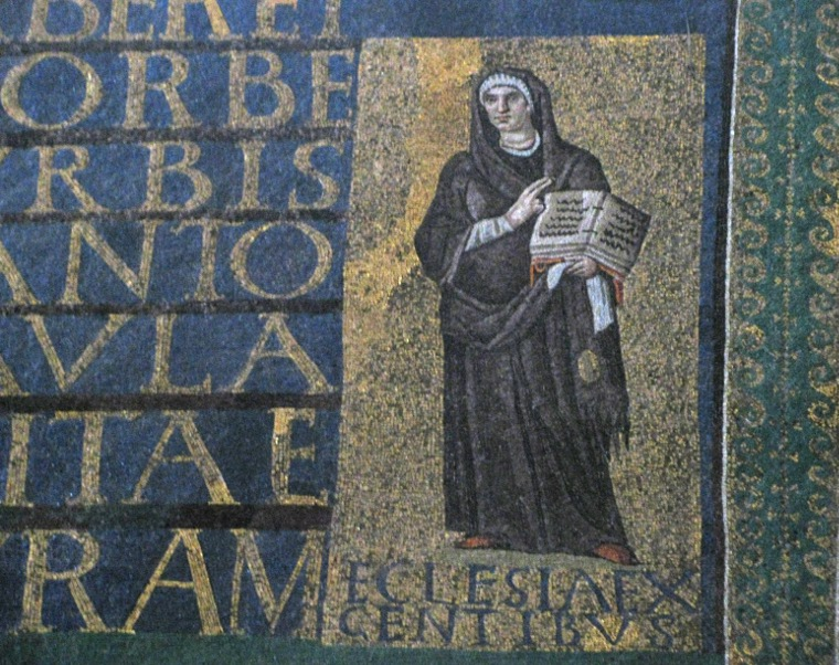 Eglise de S. Sabina, Aventin, Rome. Moniale représentant l'Eglise des gentils, détail droit de la mosaïque byzantine au-dessus de l'entrée principale